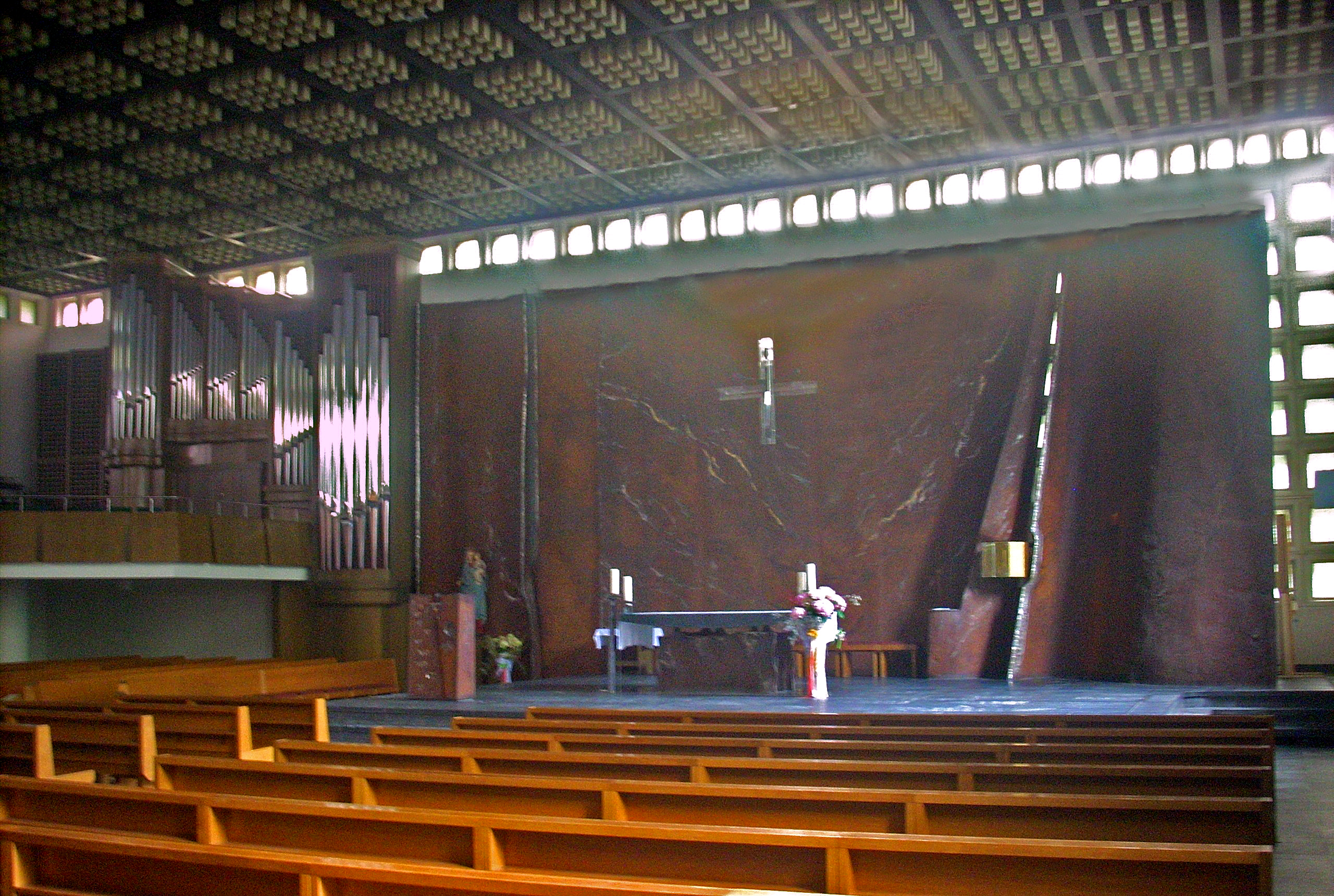 Leipzig, kath. Propsteikirche St. Trinitatis (erbaut 1982), Inneres